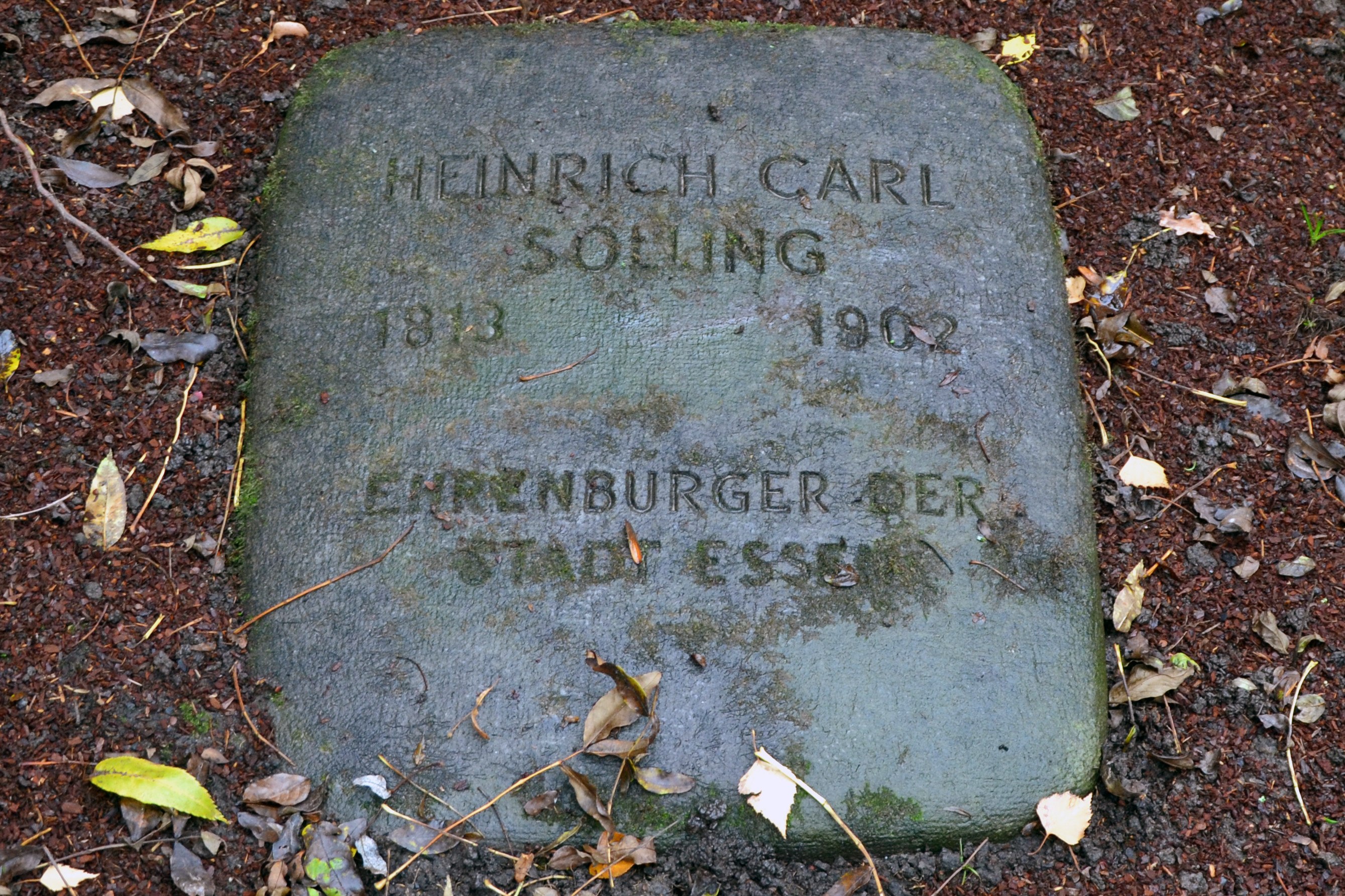 Heinrich Carl Sölling (01.06.1813 - 27.08.1902), Essener Mäzen und Ehrenbürger der Stadt - Ehrengrab der Stadt Essen auf dem Ostfriedhof